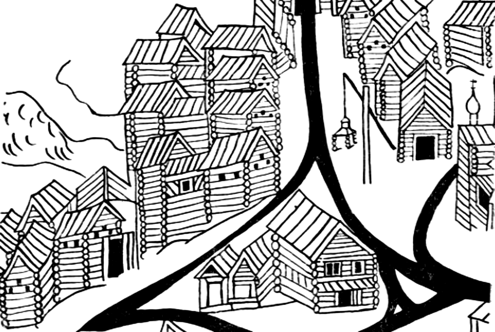 Фрагмент плана Тихвинского посада 1678 года. Полная версия